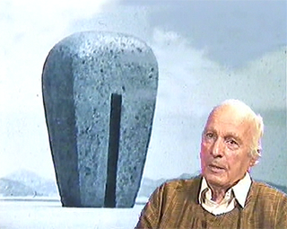 Portrait de François Stahly